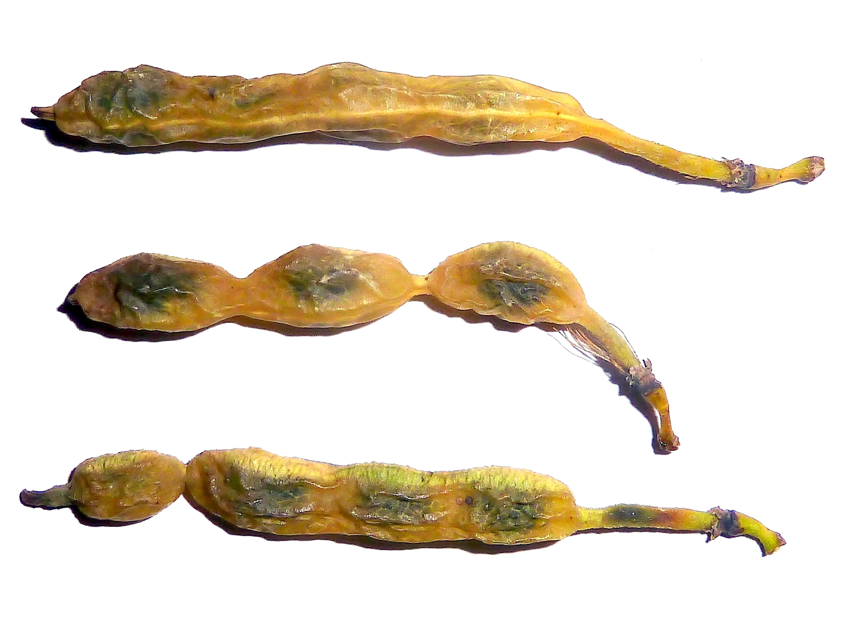 Styphnolobium japonicum (sin. Sophora japonica) - Sófora, Sofor, árbol de la miel, árbol de las pagodas, falsa acacia del Japón : legumbres monoliformes maduras - Ornamental, Calle Conde de Peñalver, Madrid (España).